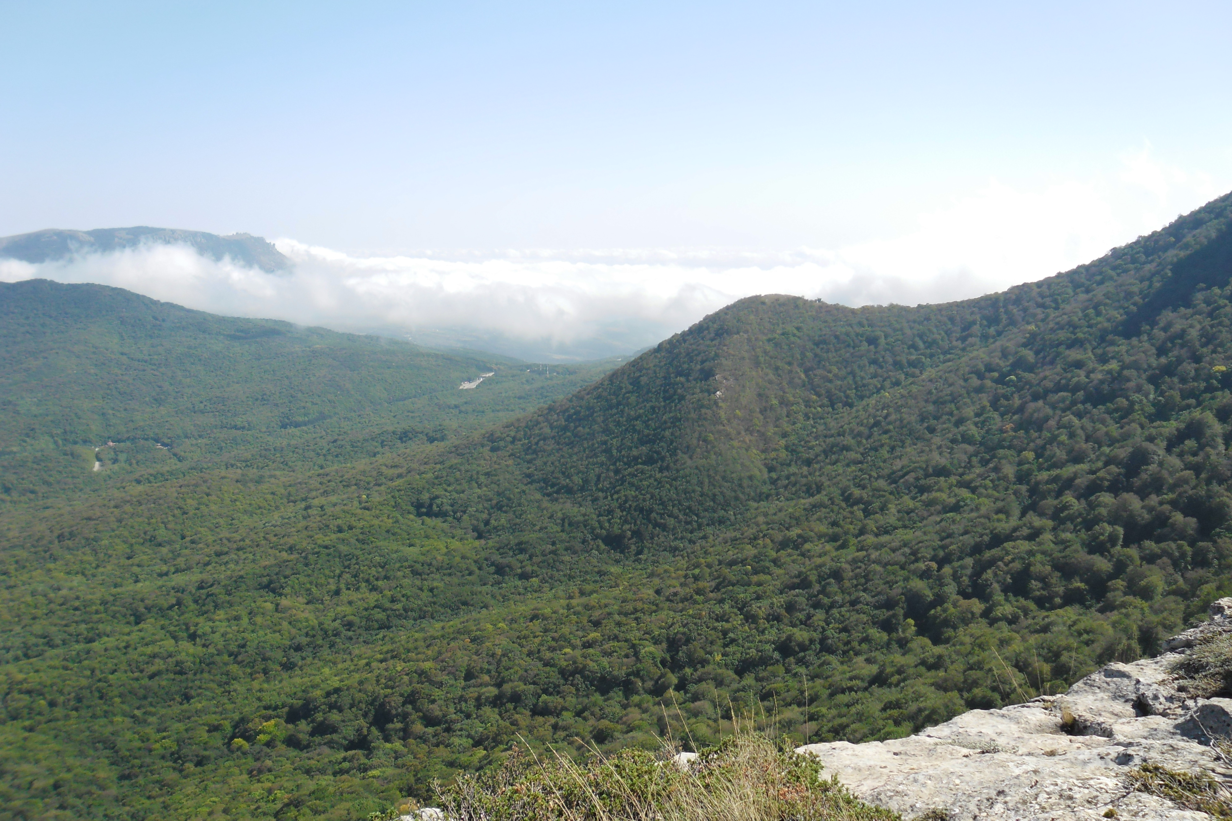 Цукрова голівка